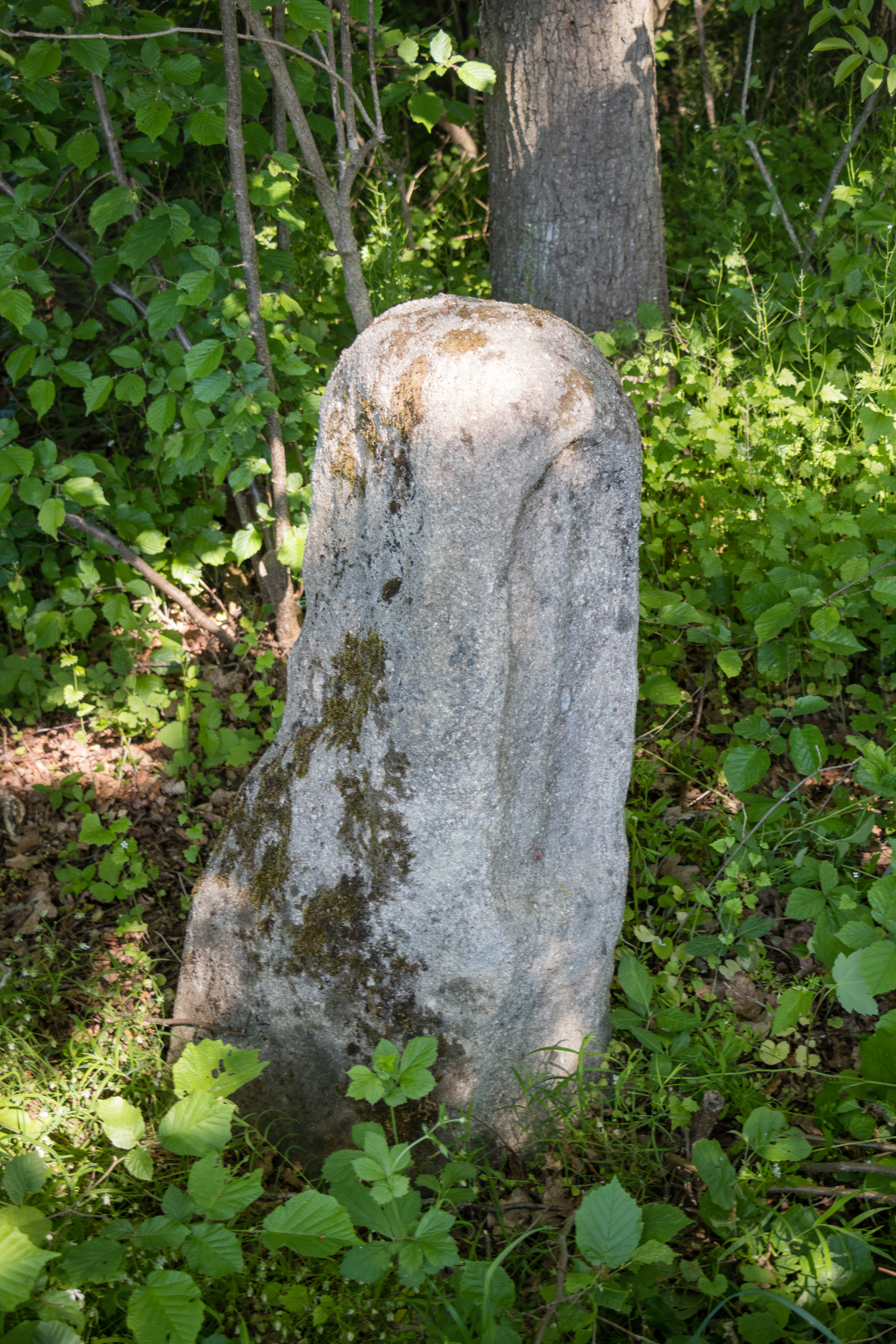 Kreuzstein, Eismannsdorf, Relief, Allersberg